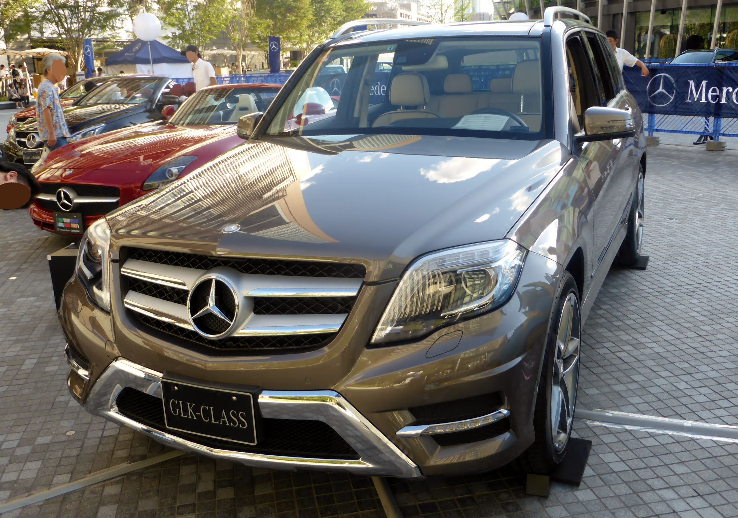 X204型メルセデス・ベンツGLK350 4MATICをフロントから撮影。